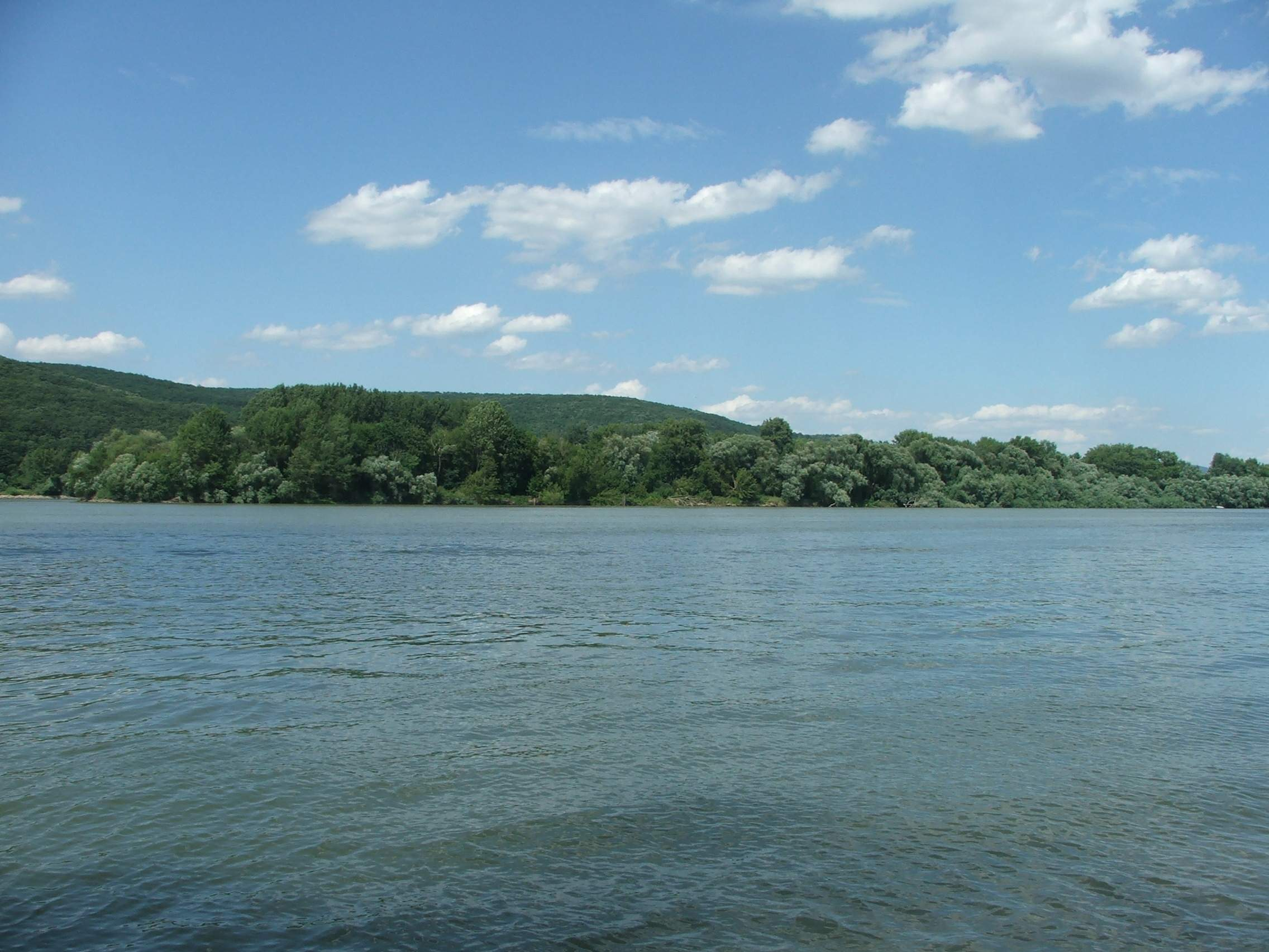 Helemba island